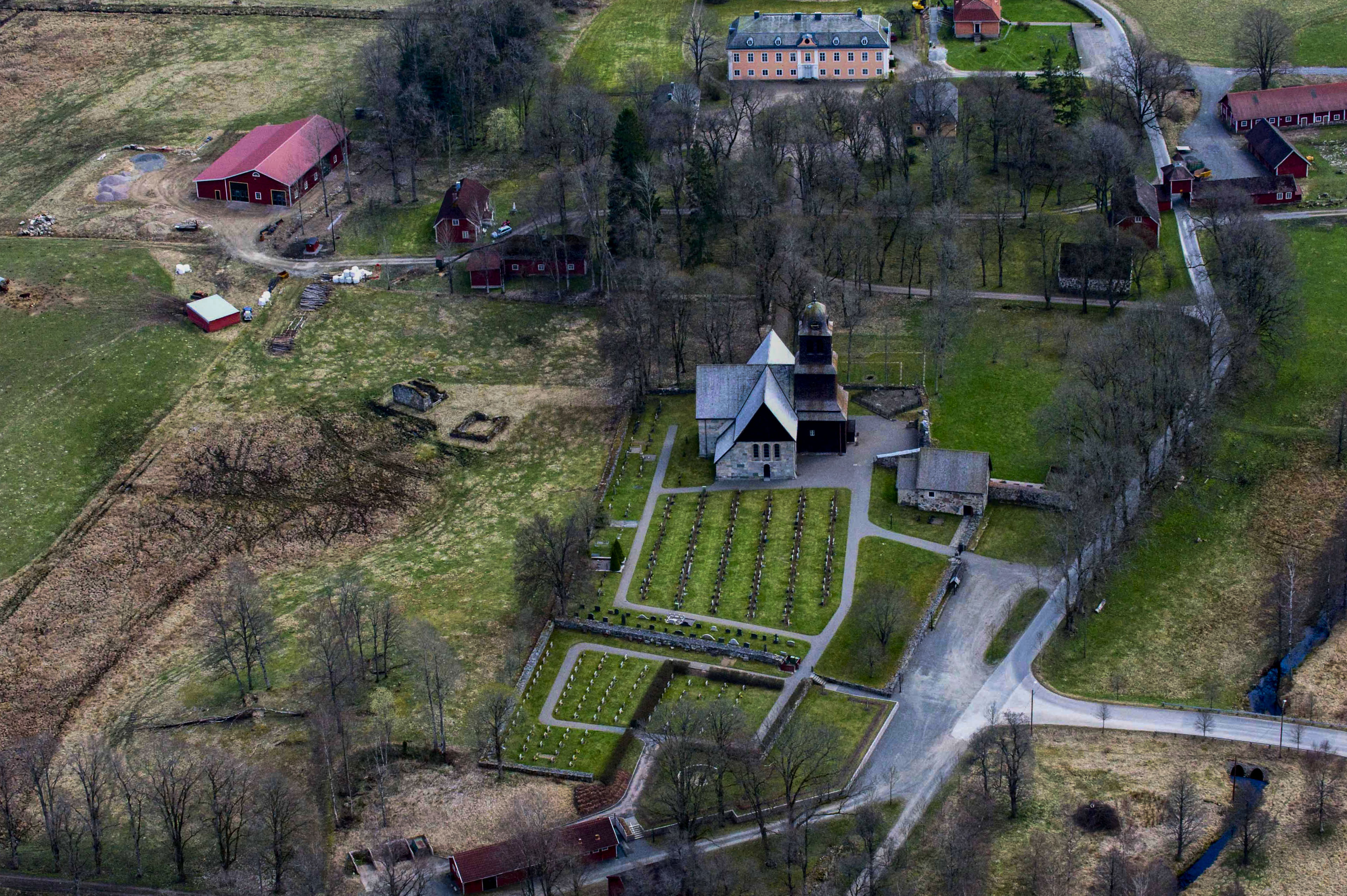 Nydala ka + klosterkyrkan